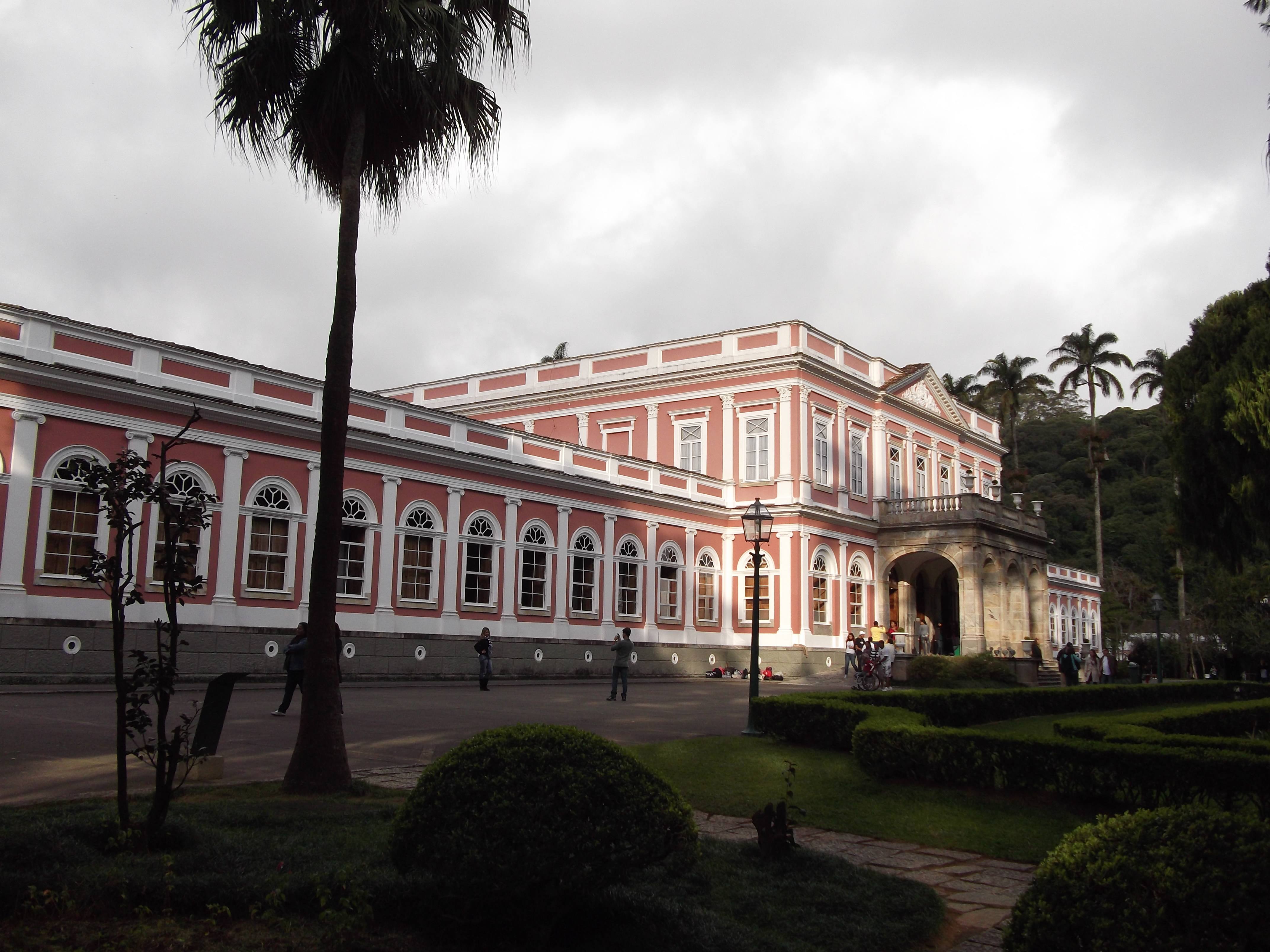 Petrópolis, estado do Rio de Janeiro, Brasil : Museu Imperial